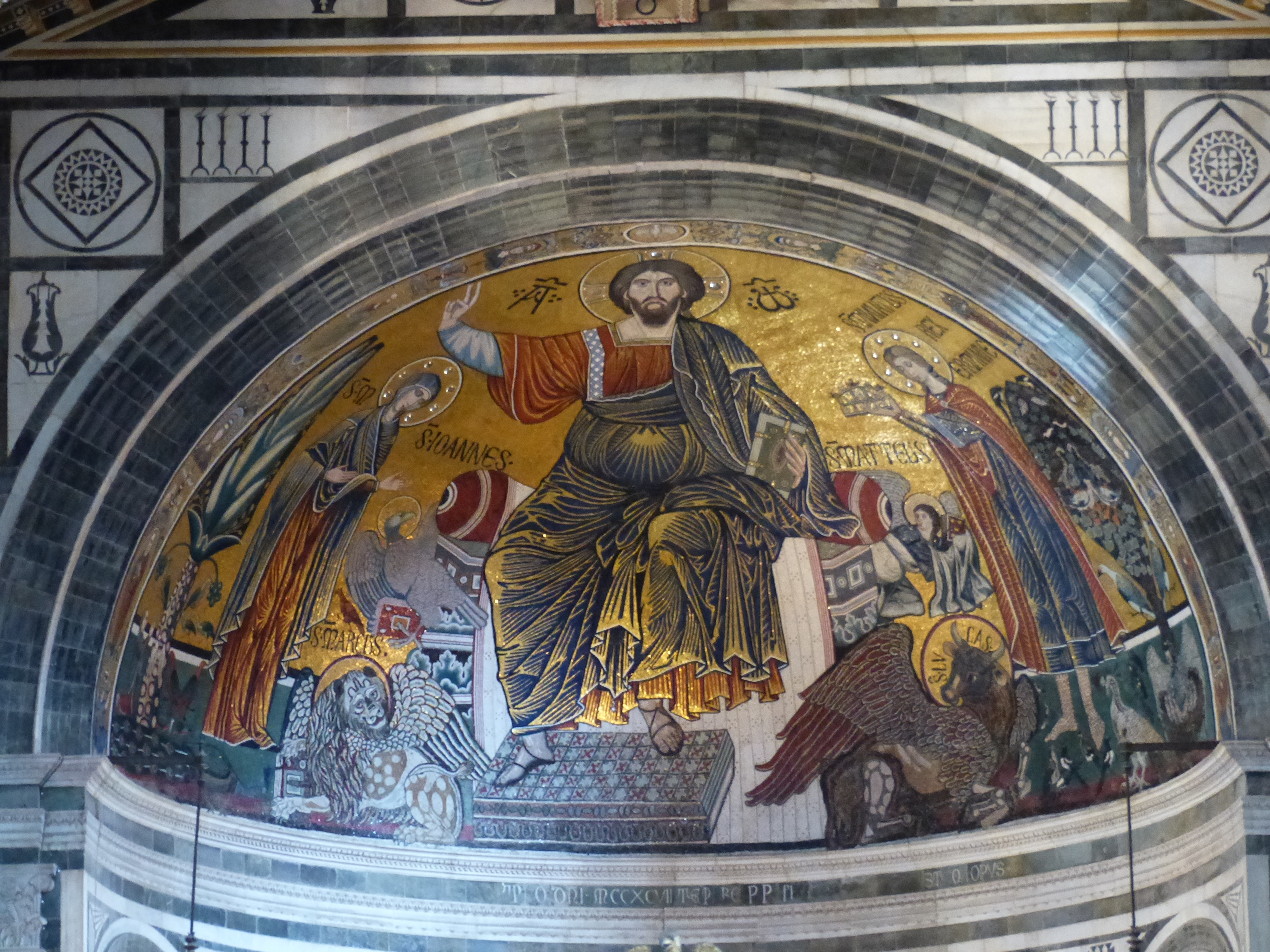 San Miniato al Monte, interior, Florencia, Italia, 2019